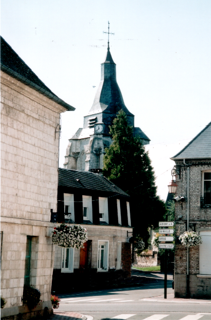 L'église d'Avesnes le comte